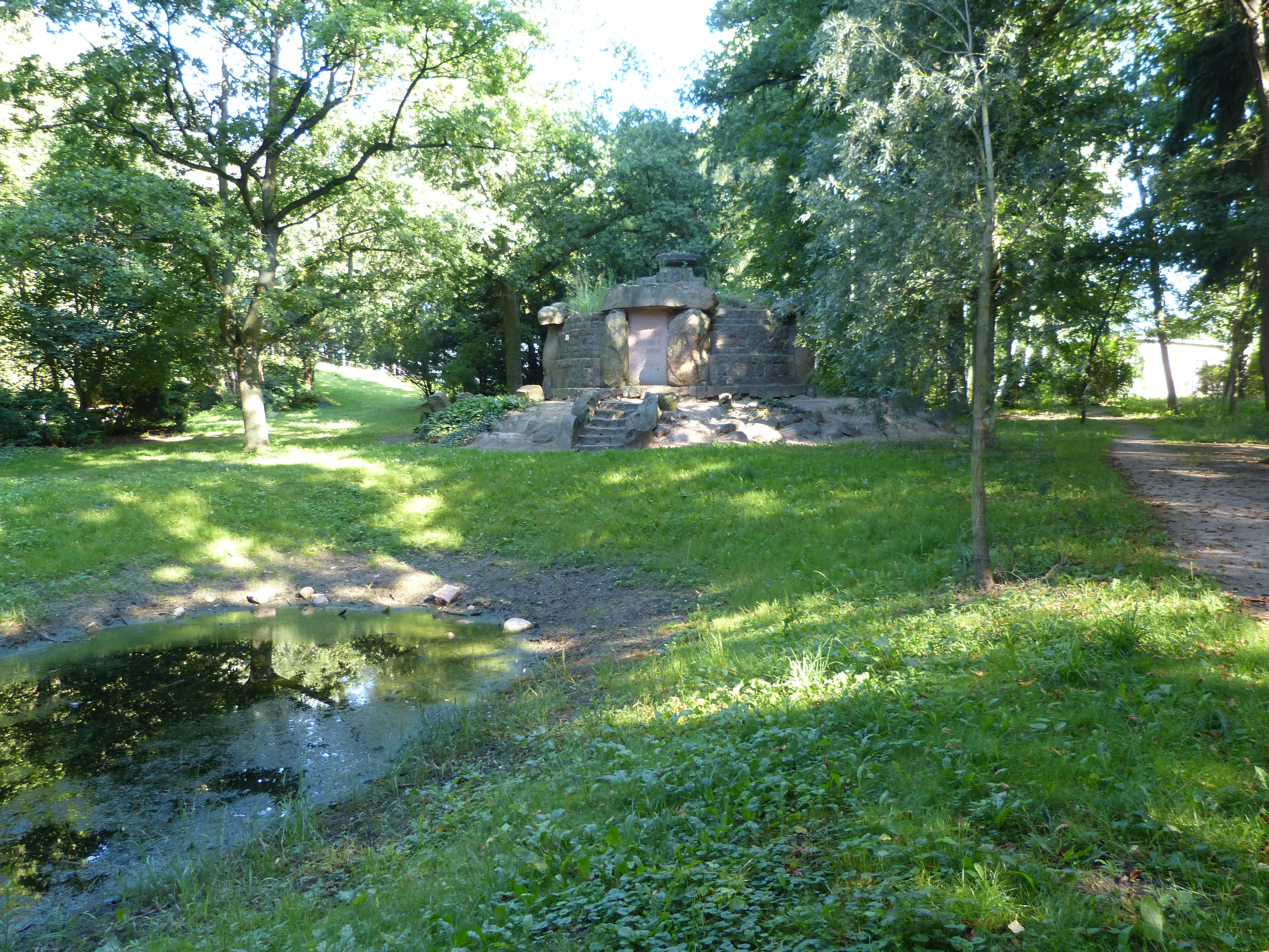 Loitz, Gülzow-Park, Denkmal für die Toten des Ersten und Zweiten Weltkriegs